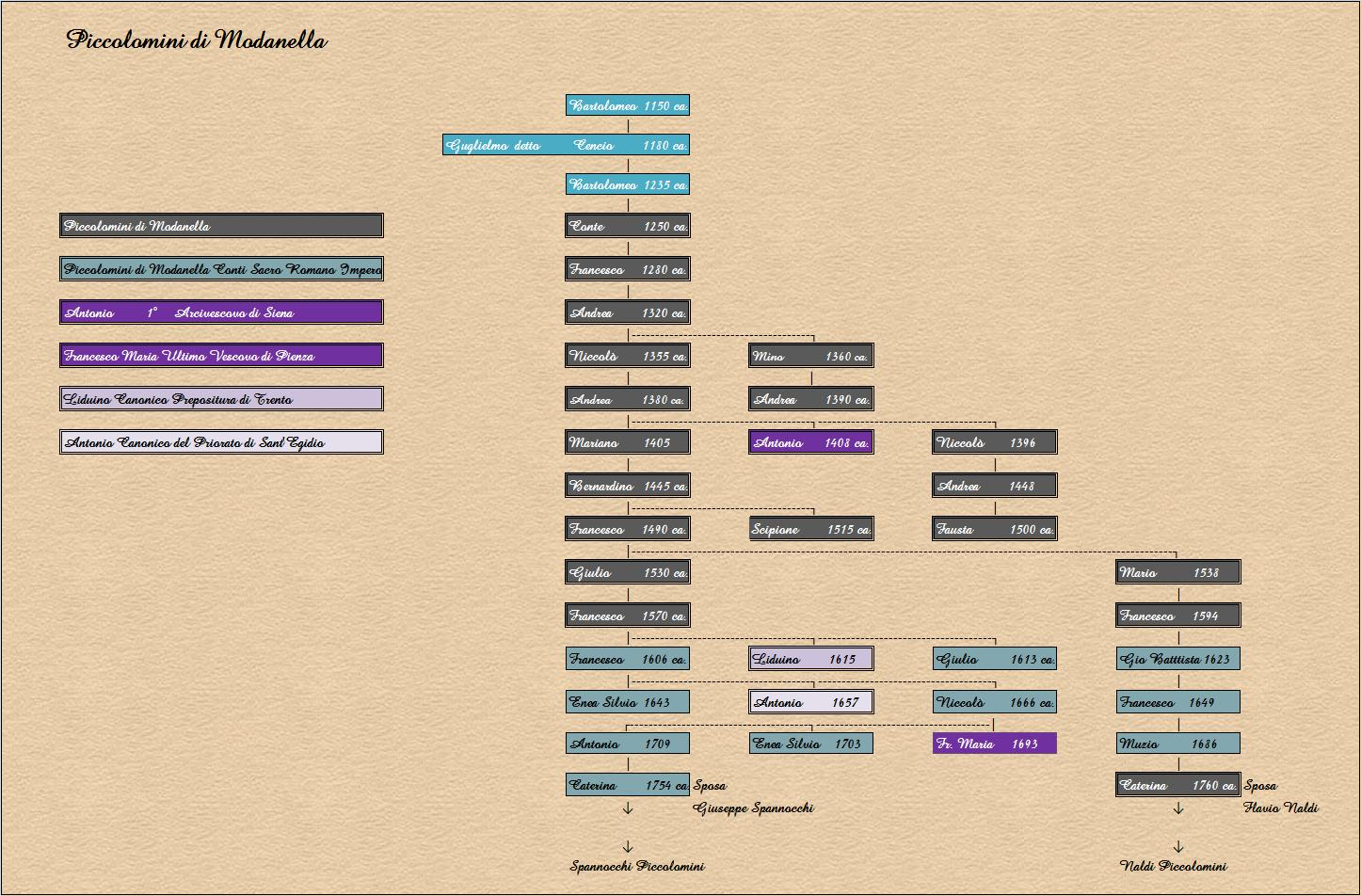 Piccolomini - Ramo di Piccolomini di Modanella (sfondo ocra marmorizzato)